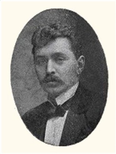 Adolf Bohuslav Dostal (1873 - 1939), Český básník, divadelní kritik a historik, dramatik a spisovatel.